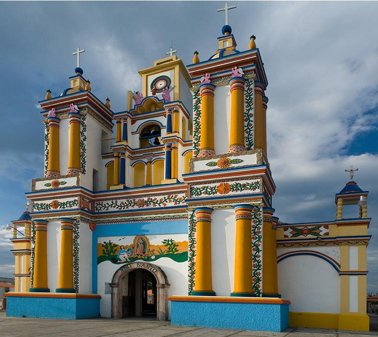 Fachada de la iglesia de Cupilco, en el estado de Tabasco. Una de las más colorídas y famosas del estado.